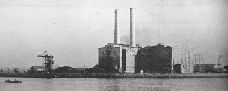 水上から見た名古屋火力発電所